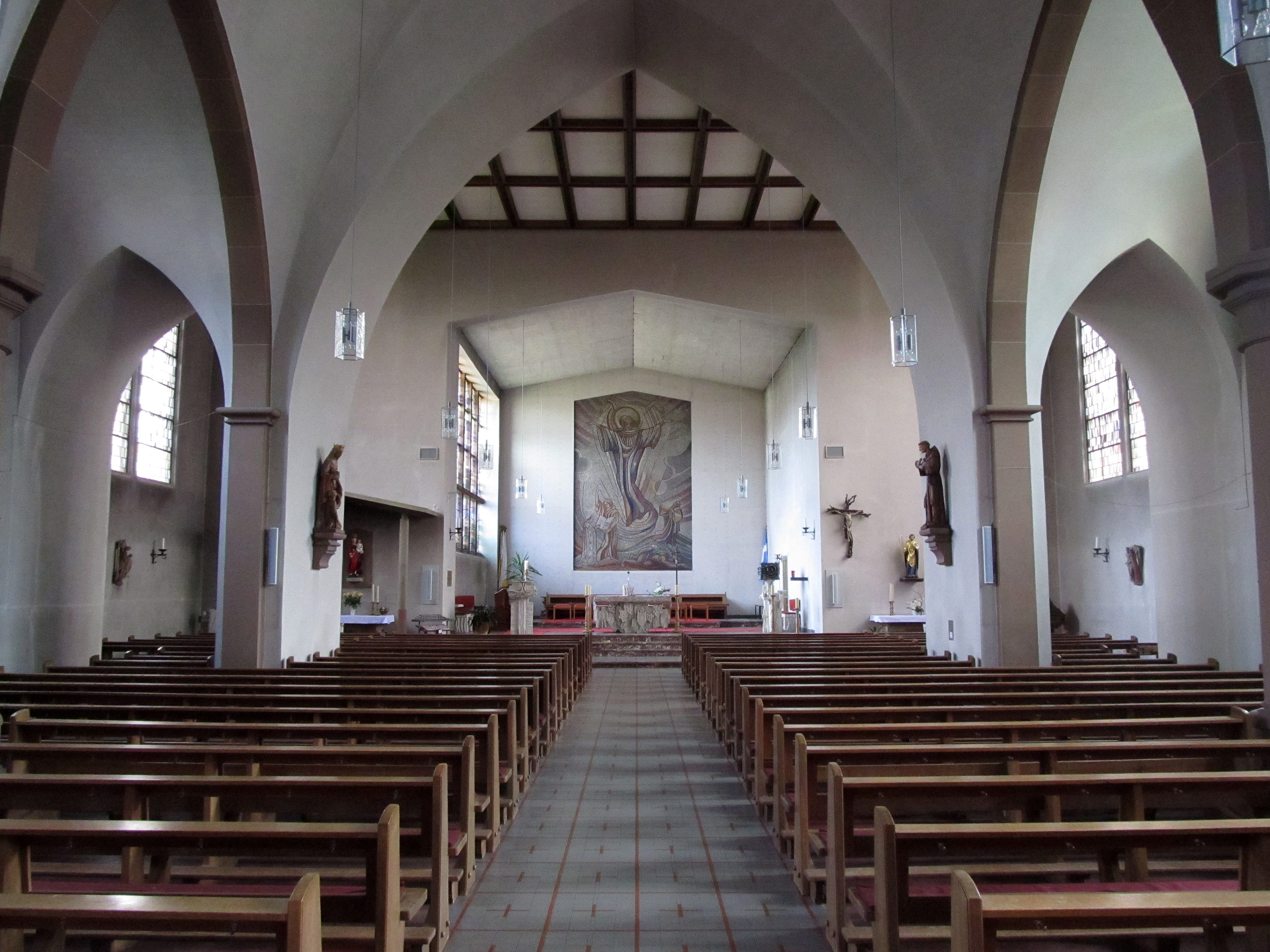 Blick ins Innere der katholischen Pfarr- und Wallfahrtskirche Mariä Himmelfahrt in Kirrberg, Saarland